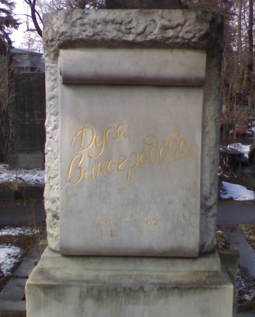 Памятник Е. В. Виноградовой на Новодевичьем кладбище, 8 уч.